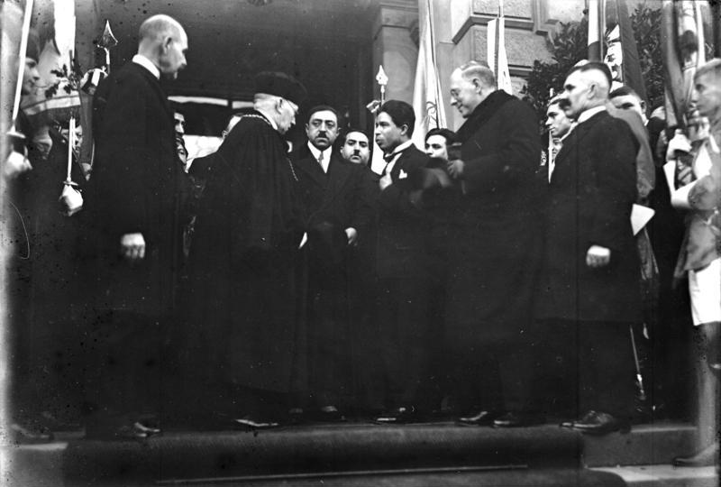 Der König Aman Ullah von Afghanistan (Mitte) nach seiner Ernennung zum Ehrendoktor, verläßt die Technische Hochschule. Links der Rektor der Technischen Hochschule Geheimrat Prof. Boost , rechts der preussische Kultursminster Dr. [Carl Heinrich] Becker beglückwünschen ihren hohen Gast.